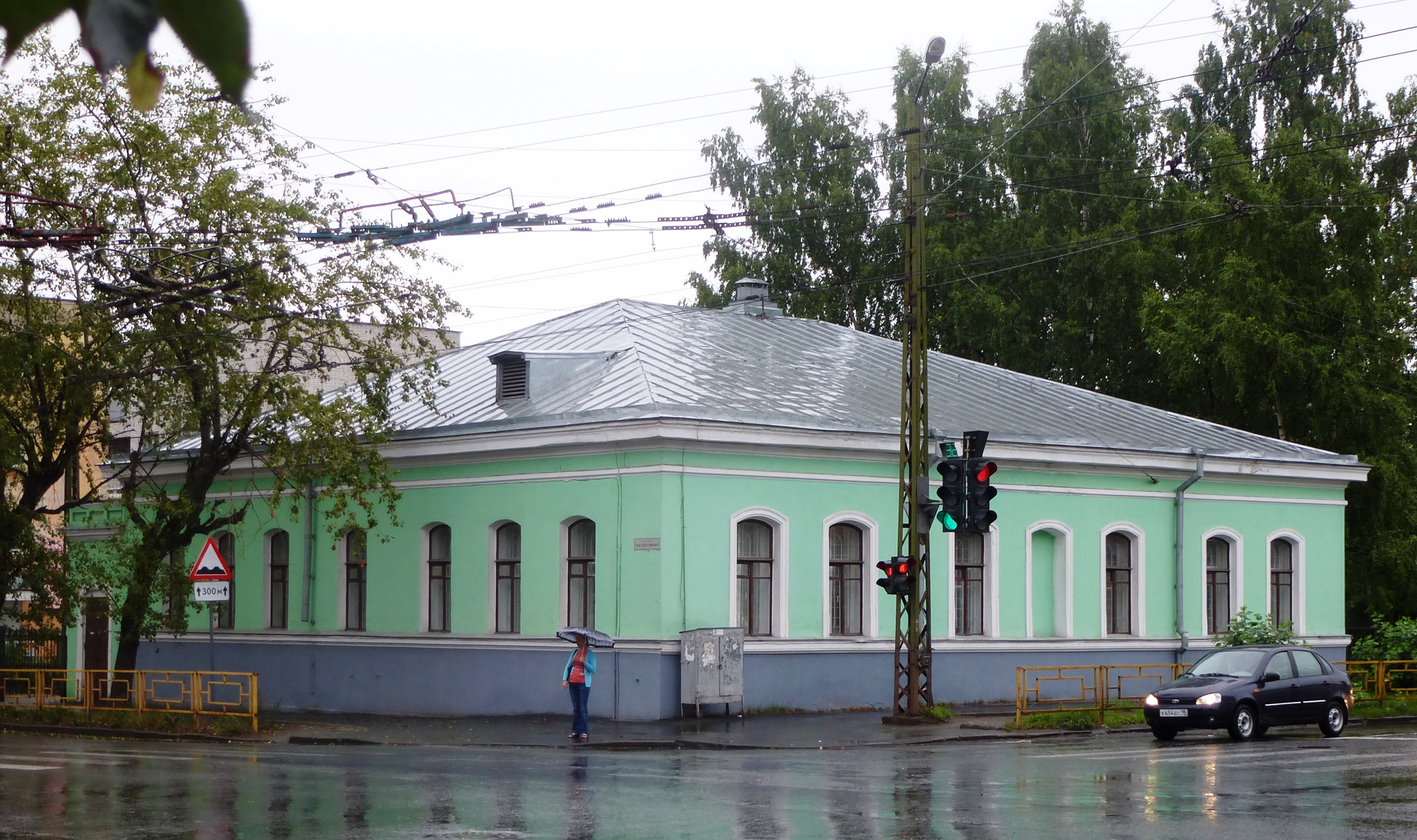 Здание миссионерского отдела Петрозаводской и Карельской епархии в Петрозаводске на перекрёстке ул.Правды и пр.А.Невского.